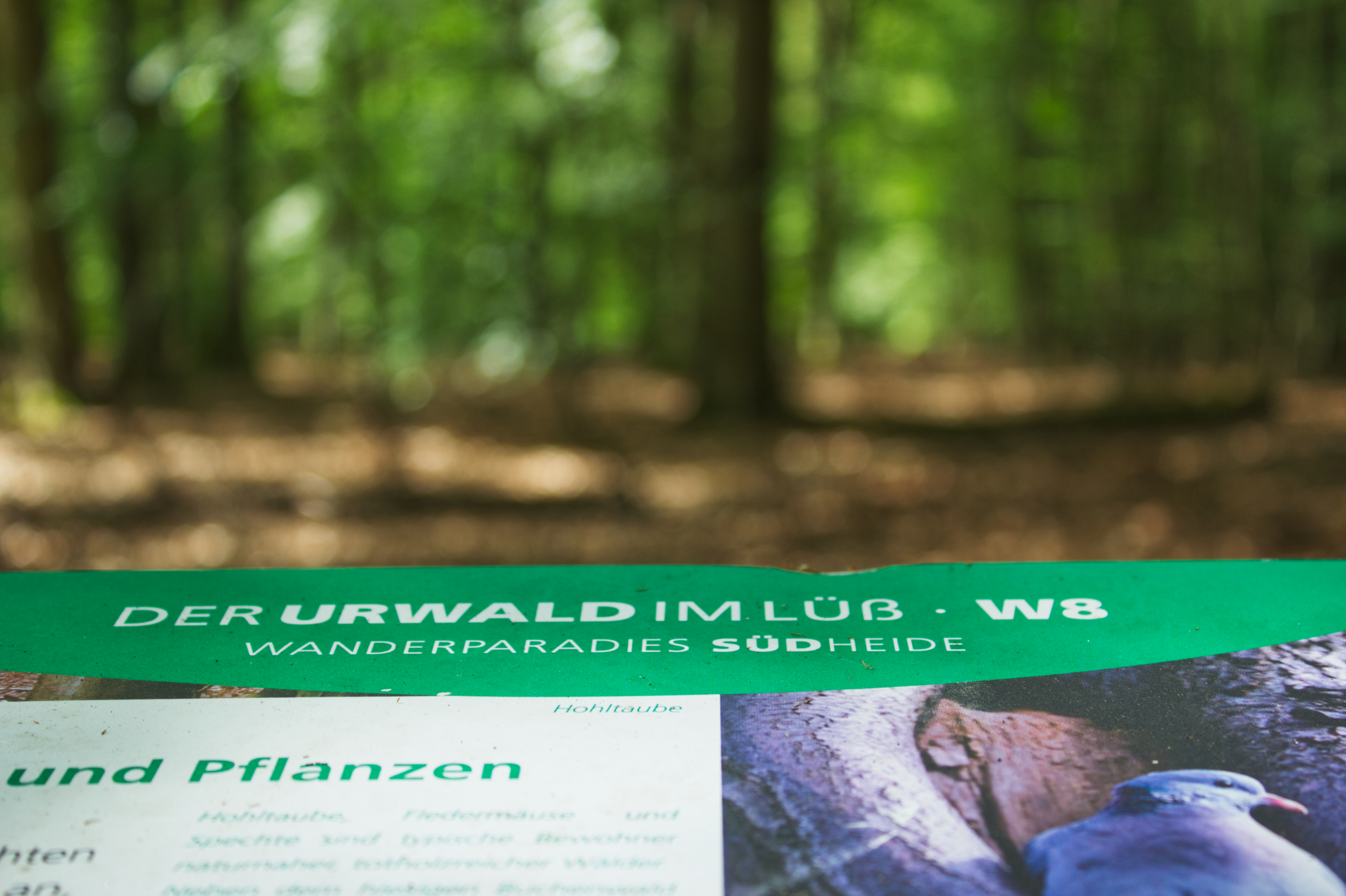 Infotafel an Rundwanderwegen der Lüneburger Heide GmbH